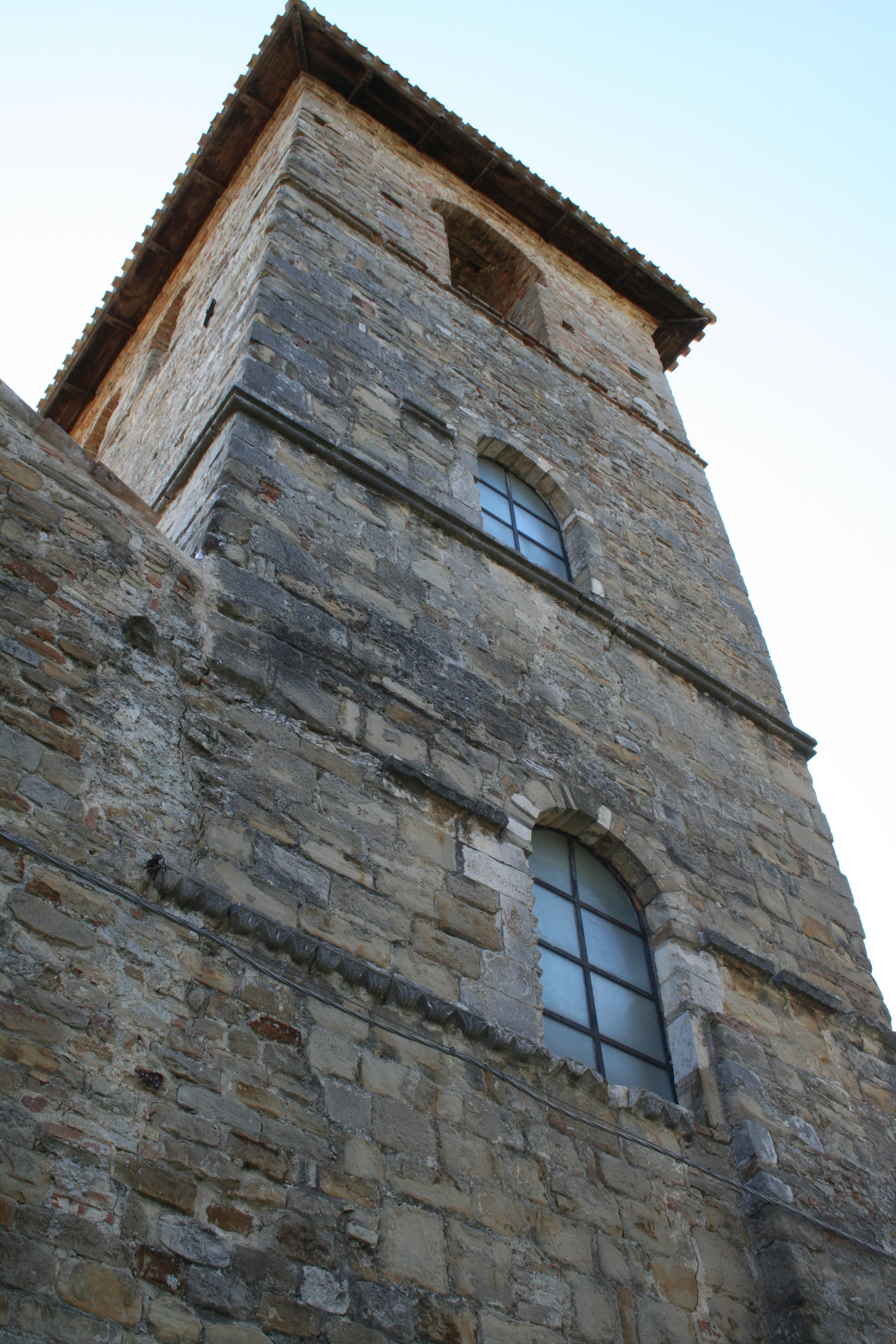 Chiesa di San Salvatore di Canzano, torre campanaria dell'edificio religioso appartenente al complesso abbaziale omonimo nel paese di Canzano in provincia di Teramo, Abruzzo, Italia.